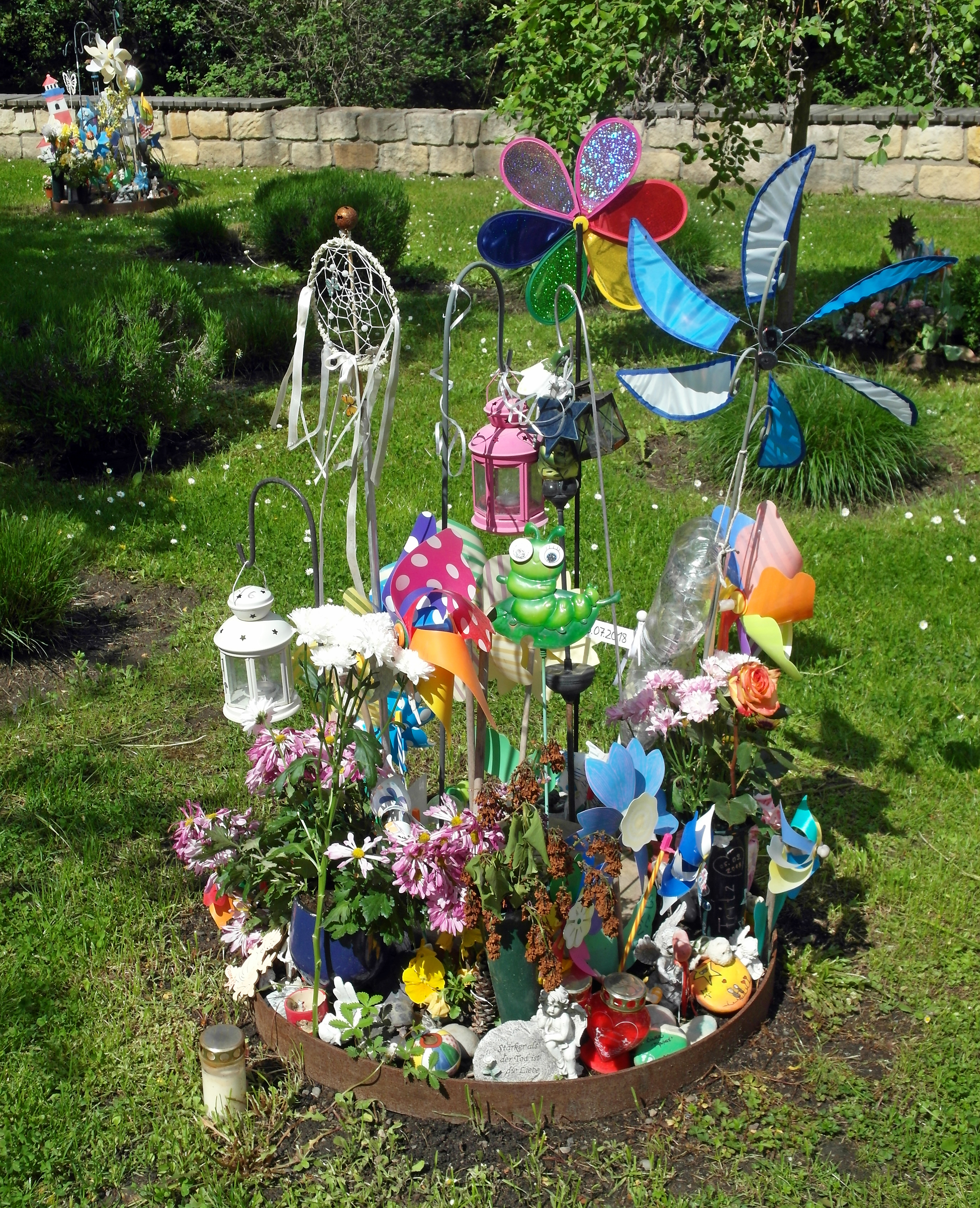 12.05.2020 01067 Dresden-Friedrichstadt, Bremer Straße 20: Neuer Katholischer Friedhof. Wiese der Sternenkinder (GMP: 51.062450,13.701050). Kinder, die in einem frühen Stadium der Schwangerschaft im Mutterleib verstorben sind. Die Stätte wurde initiiert und wird betreut vom Verein Sternenkinder Dresden e.V. [SAM2681.JPG]20200512135DR.JPG(c)Blobelt